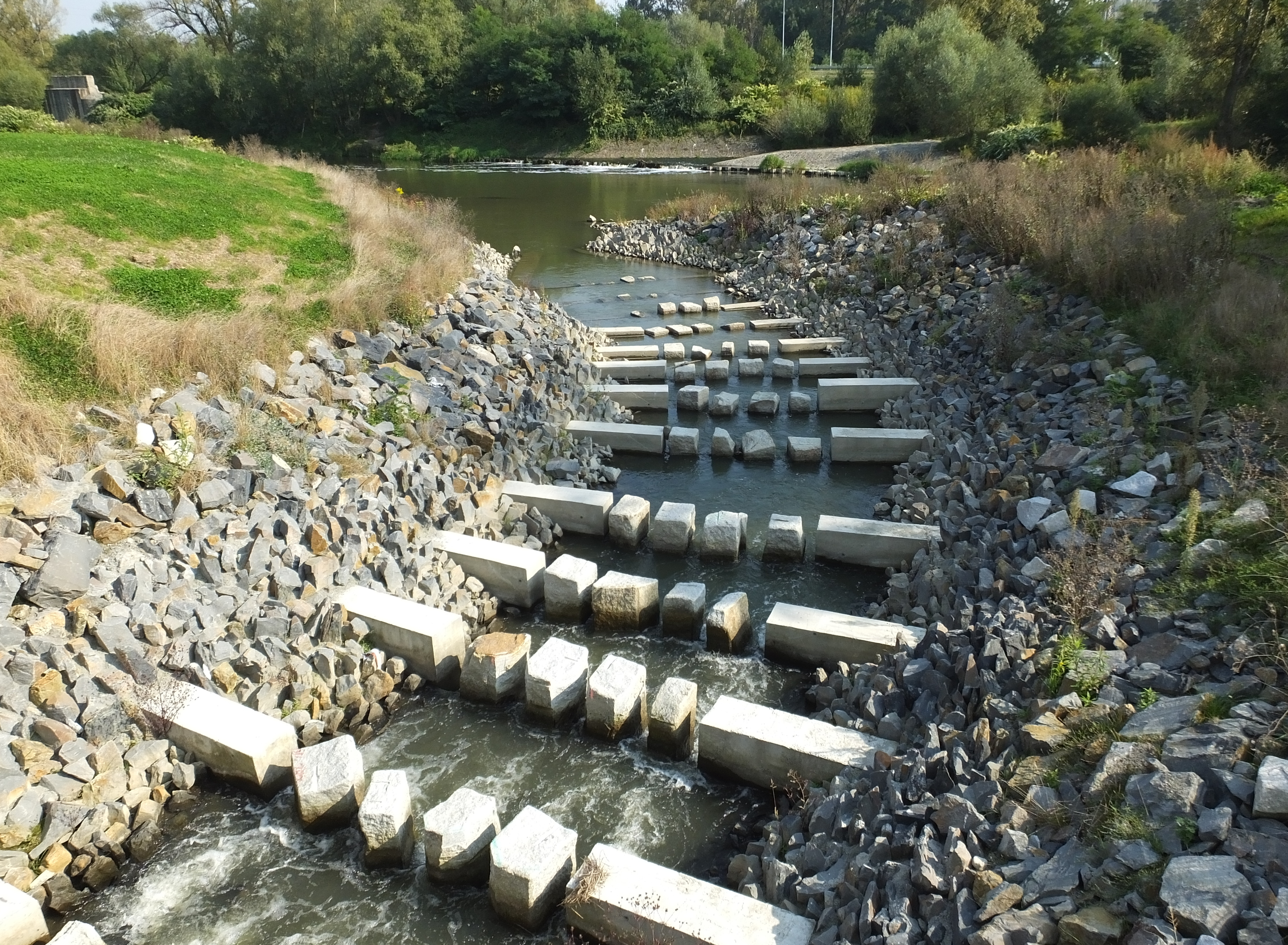 Przepławka dla ryb na Odrze Přívoz w Pietrzkowicach koło Ostrawy. Dolna część kanału obiegowego z rampą między wylotem wody (wejściem dla ryb) a ujściem kanału do Odry. W głębi ujście Černego Potoku do Odry.